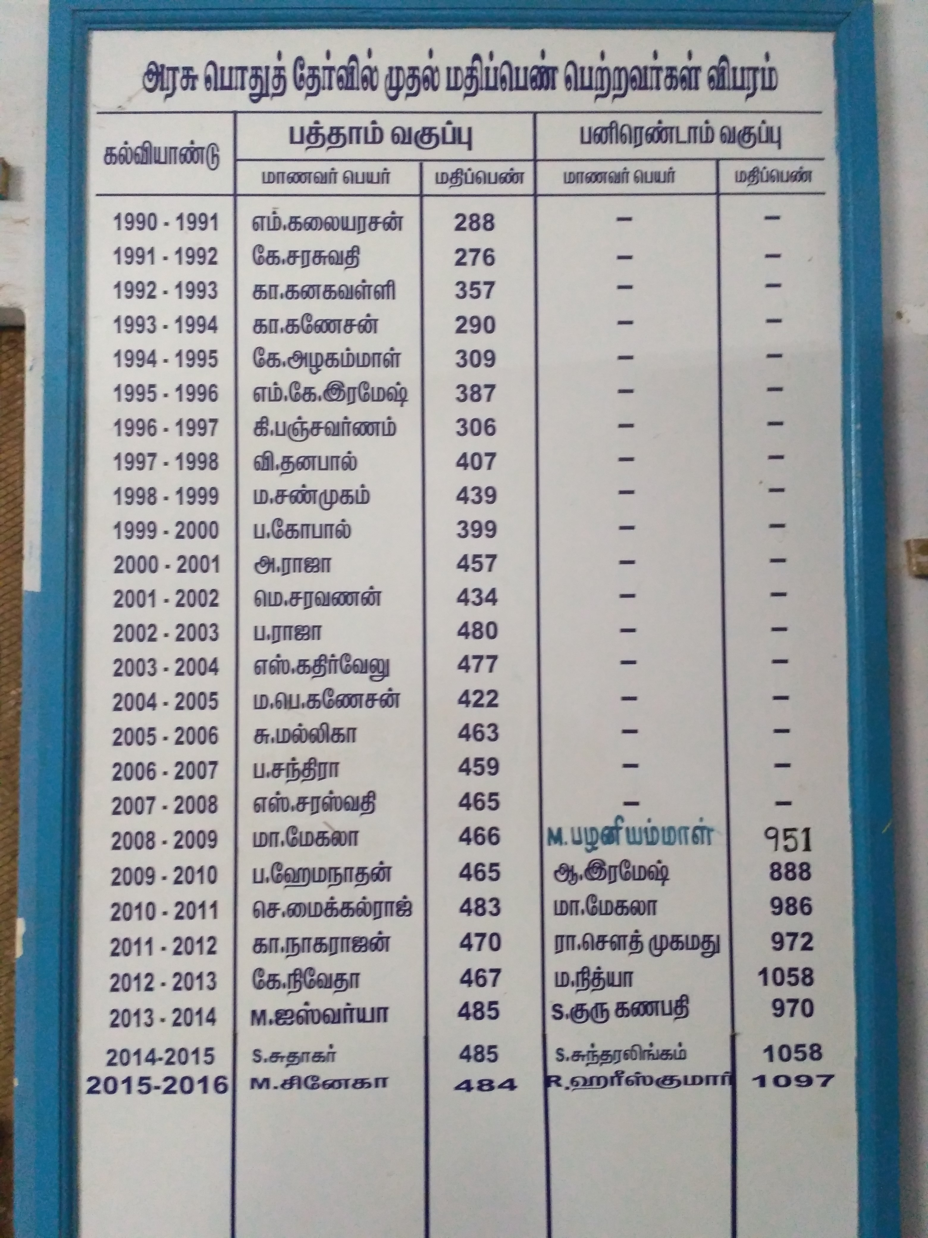 ஆலவயல் பள்ளி தேர்ச்சி சதவீத பட்டியல்